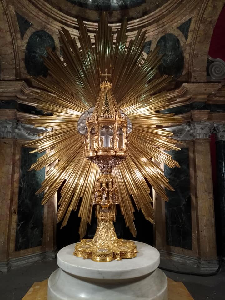 Reliquiario gotico della Vera Croce nella chiesa di Santa Croce a Padova, risalente al XV secolo, esposto sull'altar maggiore nella festa dell'Esaltazione della Croce il 14 settembre 2018